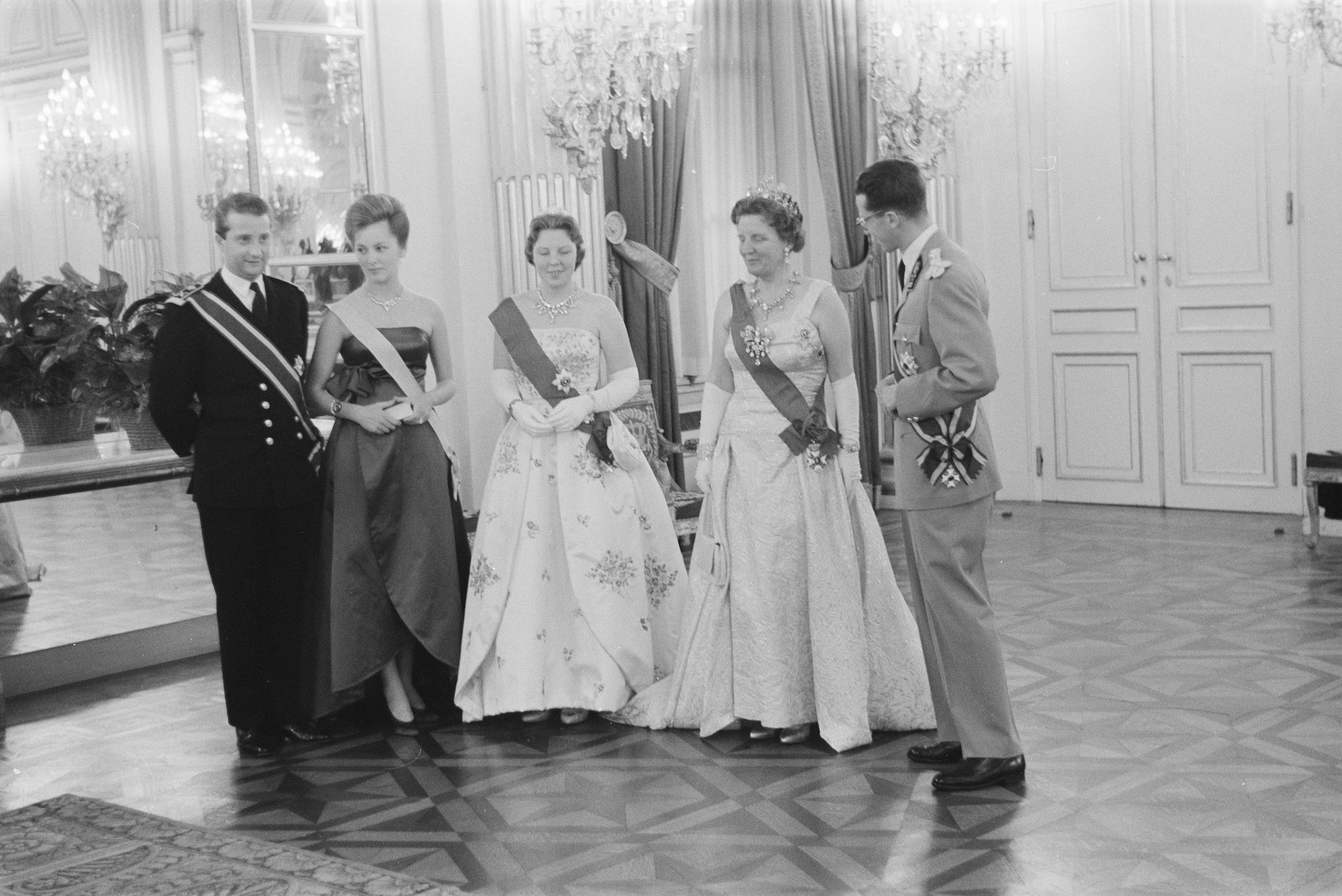 Collectie / Archief : Fotocollectie Anefo Reportage / Serie : [ onbekend ] Beschrijving : Tweede dag van het Koninklijk bezoek aan Belgie, aankomst en bezoek aan Plantijnmuseum, v.l.n.r. Prins Albert , Prinses Paola , Prinses Beatrix Datum : 31 mei 1960 Locatie : België Trefwoorden : aankomsten, bezoeken, koninginnen Persoonsnaam : Albert prins, Beatrix, prinses, Paola, prinses van België Fotograaf : Pot, Harry / Anefo Auteursrechthebbende : Nationaal Archief Materiaalsoort : Negatief (zwart/wit) Nummer archiefinventaris : bekijk toegang 2.24.01.05 Bestanddeelnummer : 911-3015